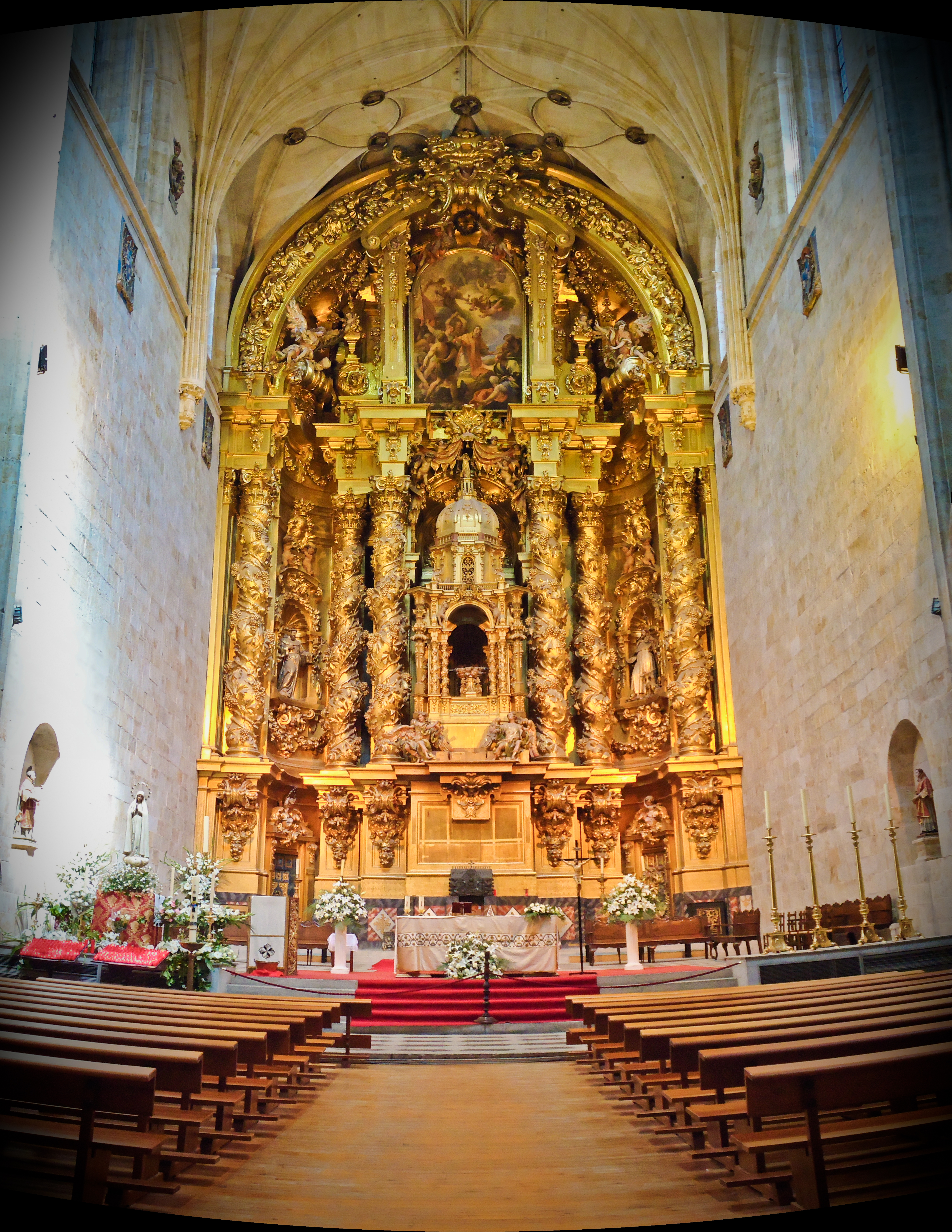 Retablo de la iglesia del convento de San Esteban - Salamanca